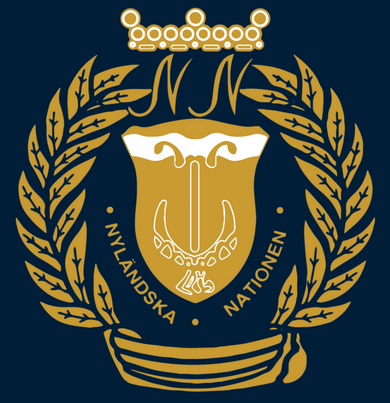 Nyländska Nationens logo